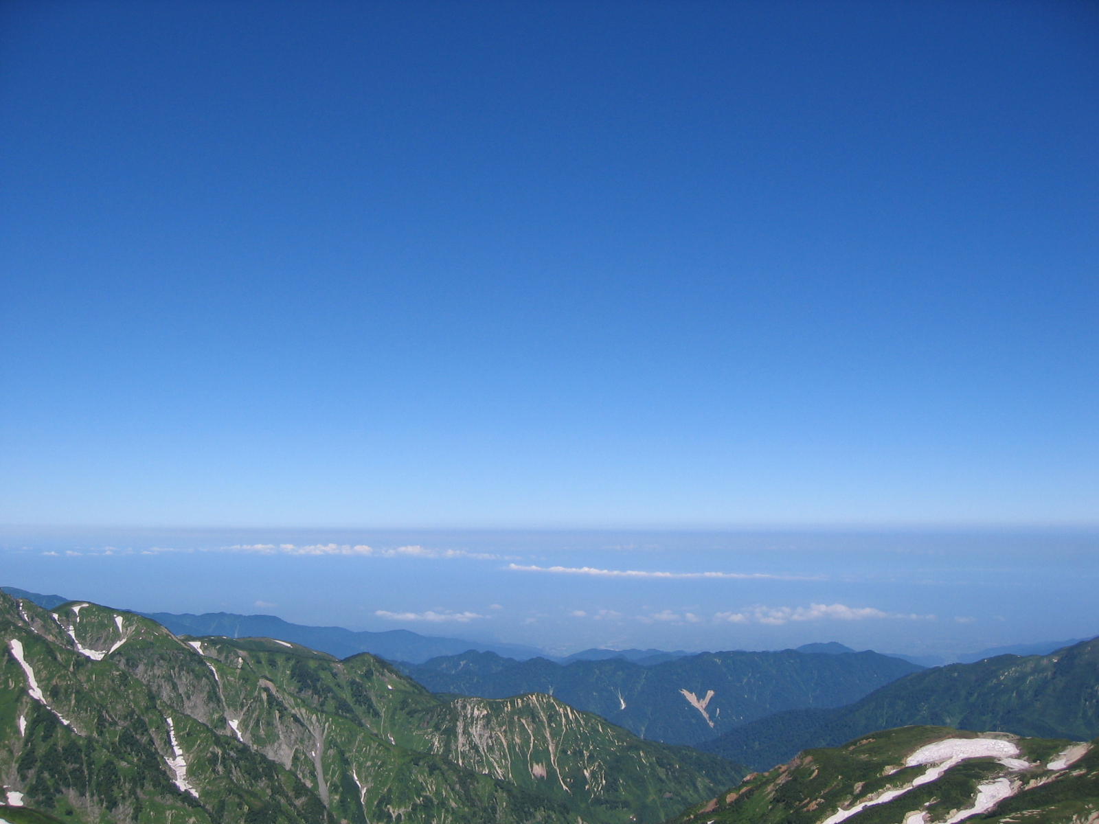 快晴